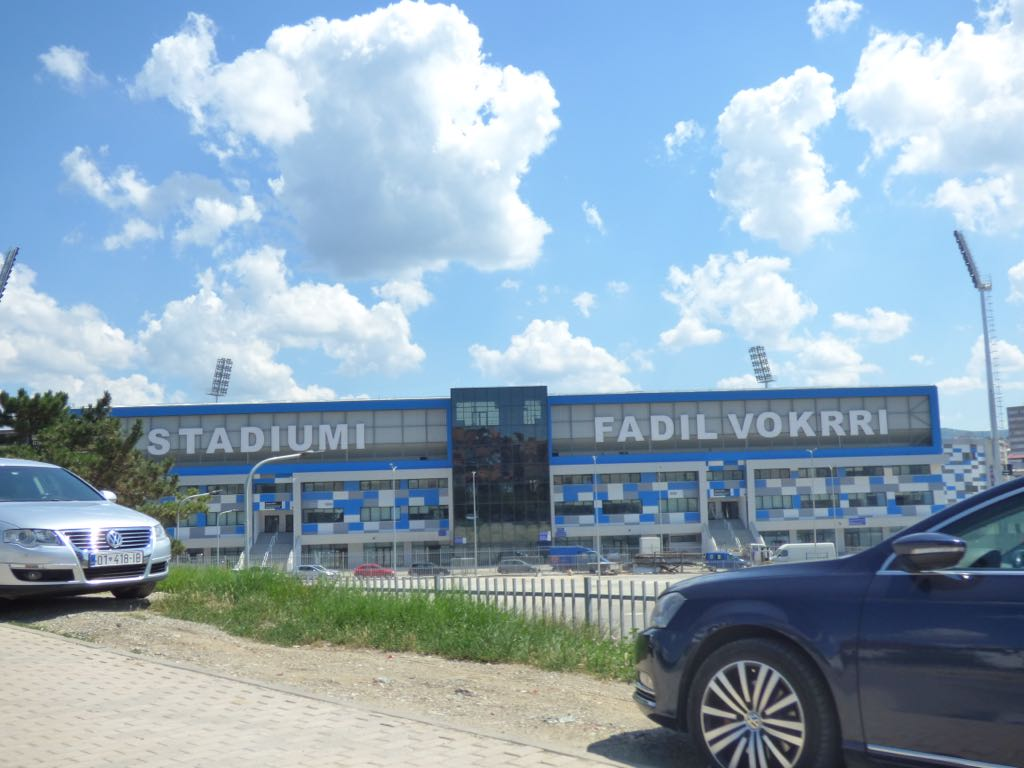 Der Eingang des Fadil-Vokrri-Stadions in Pristina, Kosovo